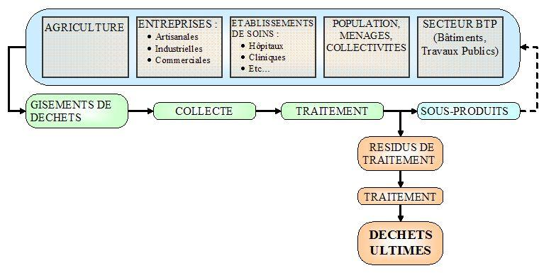 Synoptique de production d'un déchet ultime